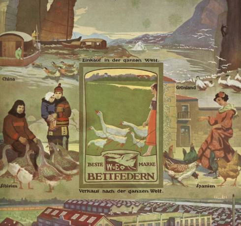 Werbeanzeige für die Bettfedern- und Daunenfabrik Werner & Ehlers aus dem Jahr 1911 ...